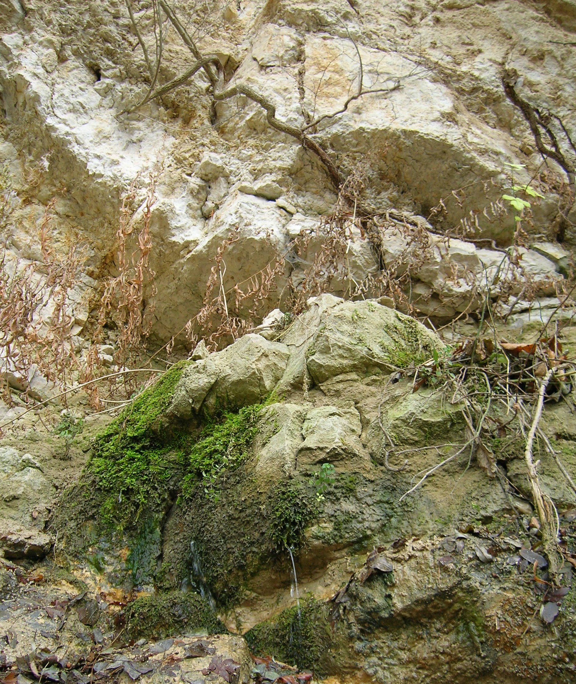 Stary Łom. Zalas